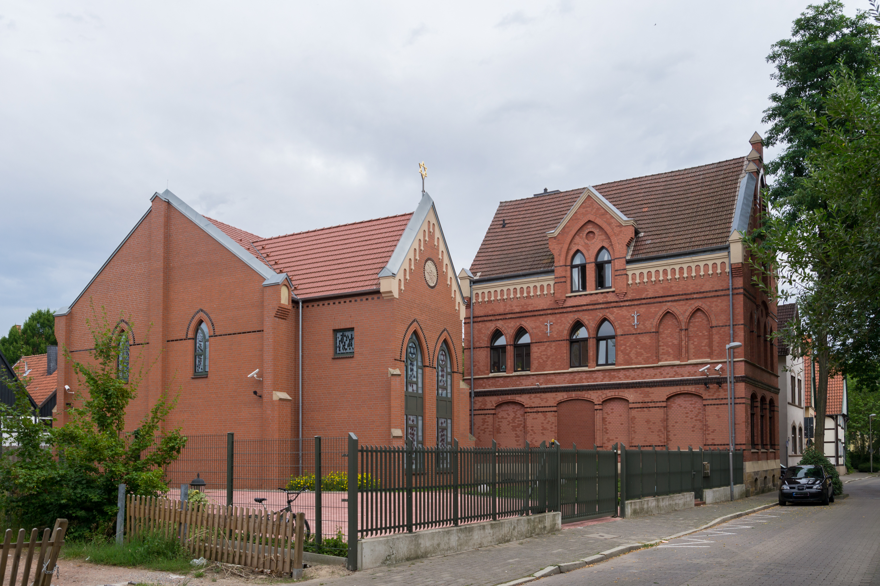 Synagoge und jüdisches Gemeindehaus in Herford